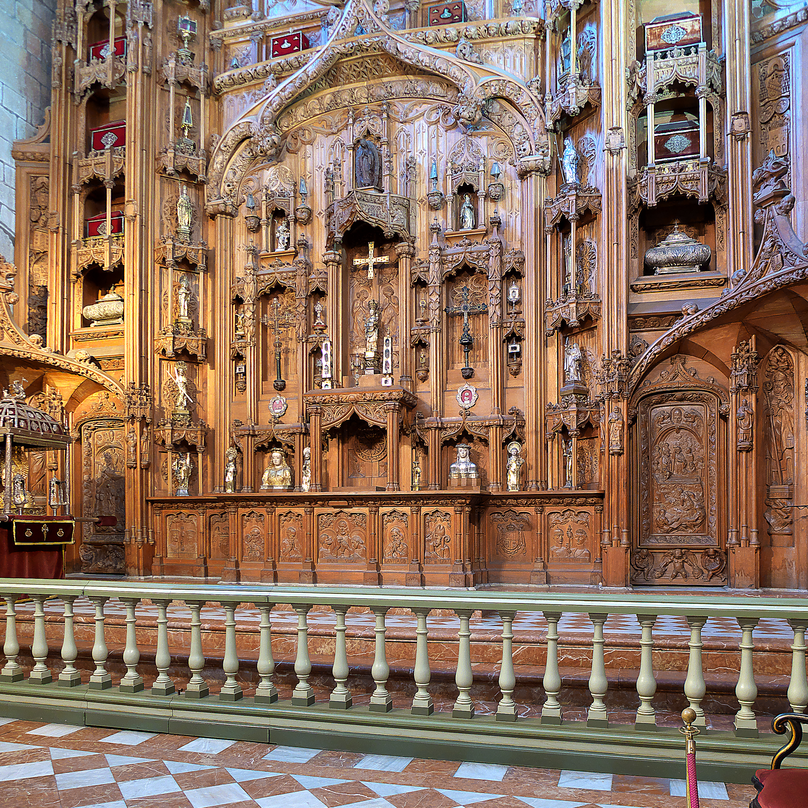 Retablo en madera de cedro de Maximino Magariños Rodríguez (1924)